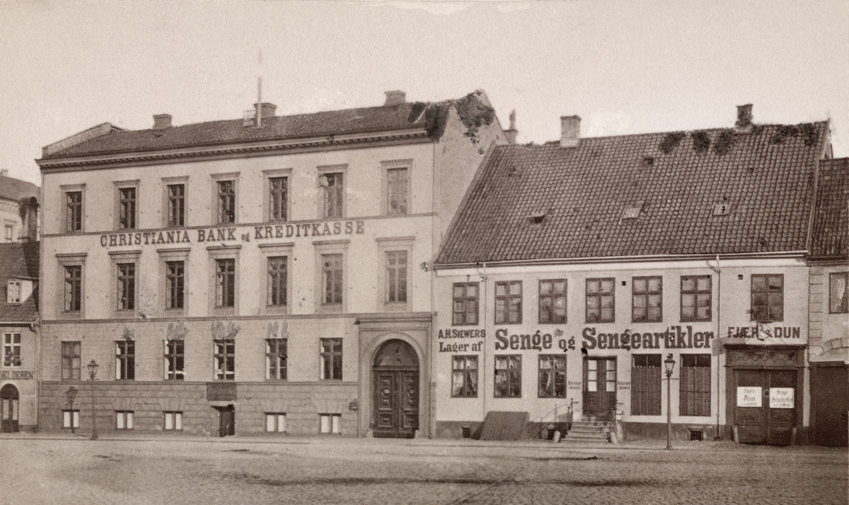 Stortorvets sydlige del. Stortorvet 6 og 7, fra venstre mot høyre. Christiania bank og kreditkasse til venstre, sengeforretning til høyre. Tilhører Oslo Museum